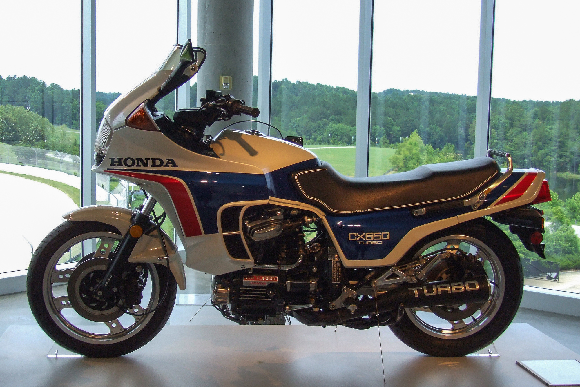 Honda CX650 Turbo (1983) im Barber Vintage Motorsports Museum, Birmingham Alabama USA